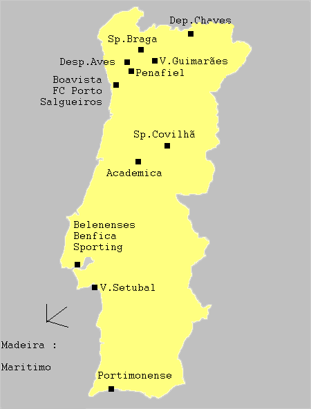 carte des clubs du championnat du portugal de football 1985-1986